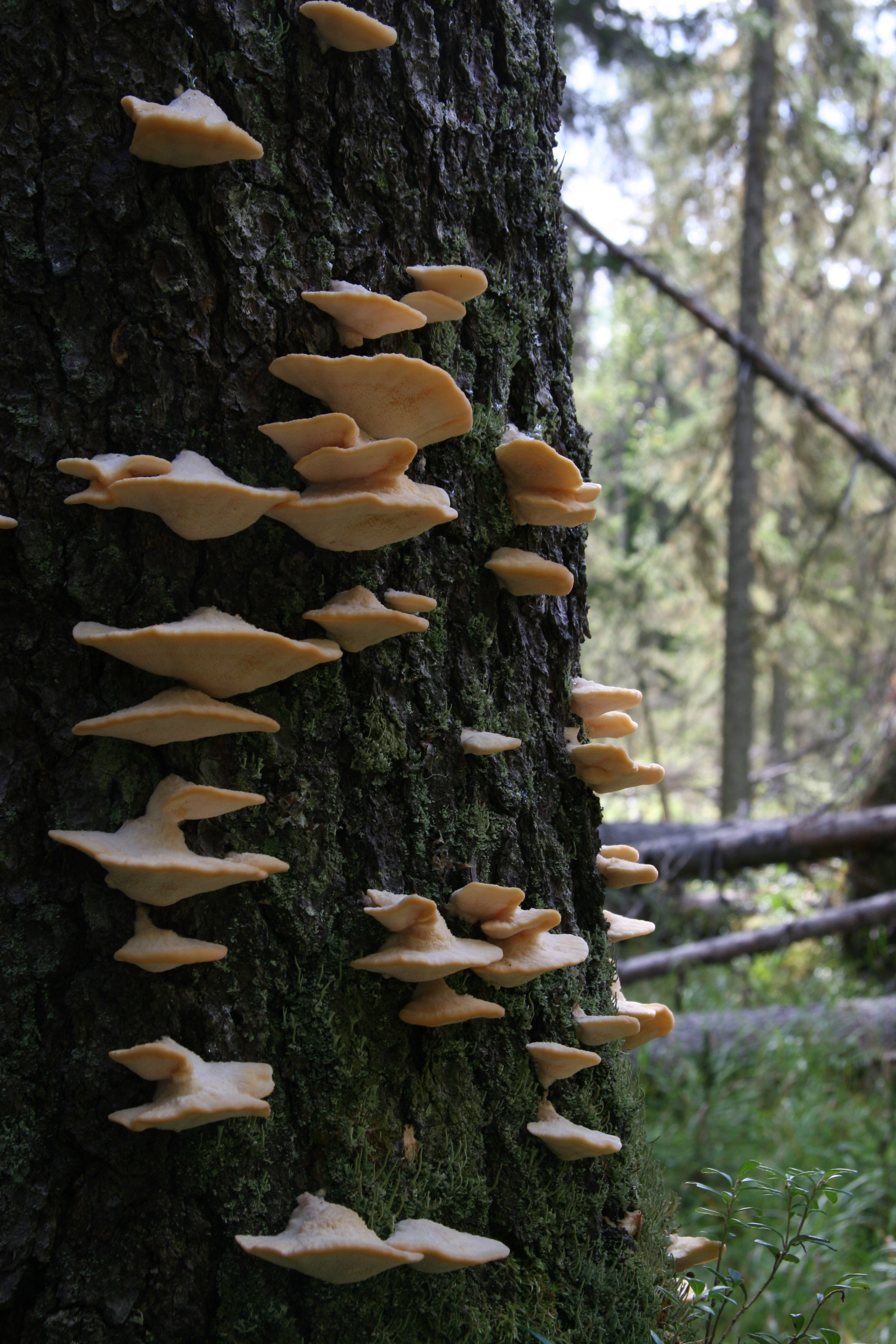 Trådticka